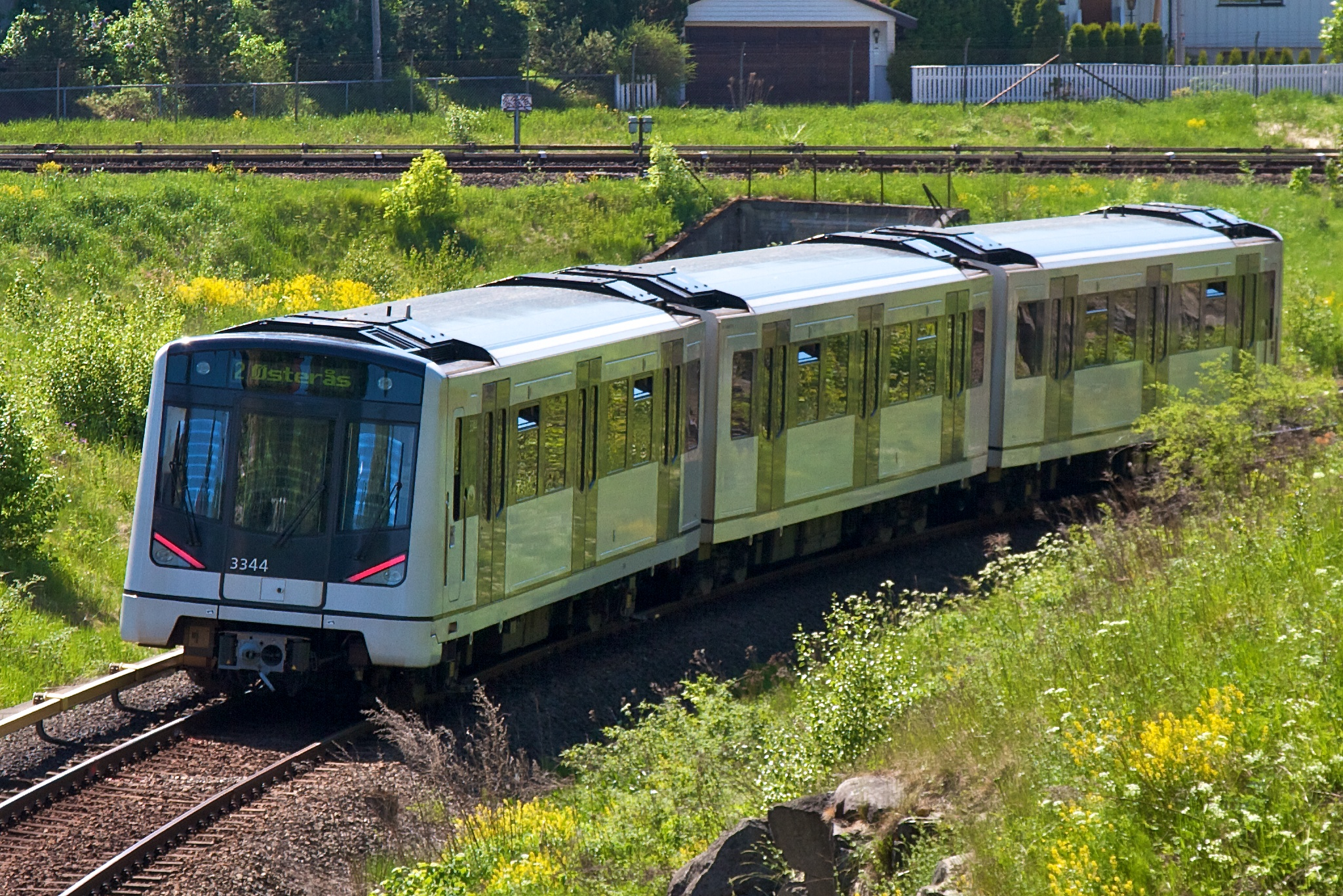 MX3000-tog mellom Tveita og Hellerud.